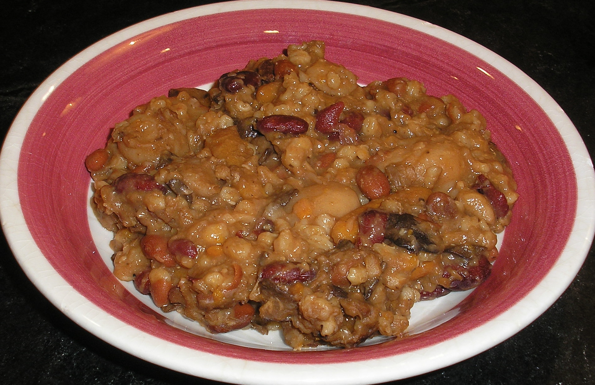 Vegetable cholent